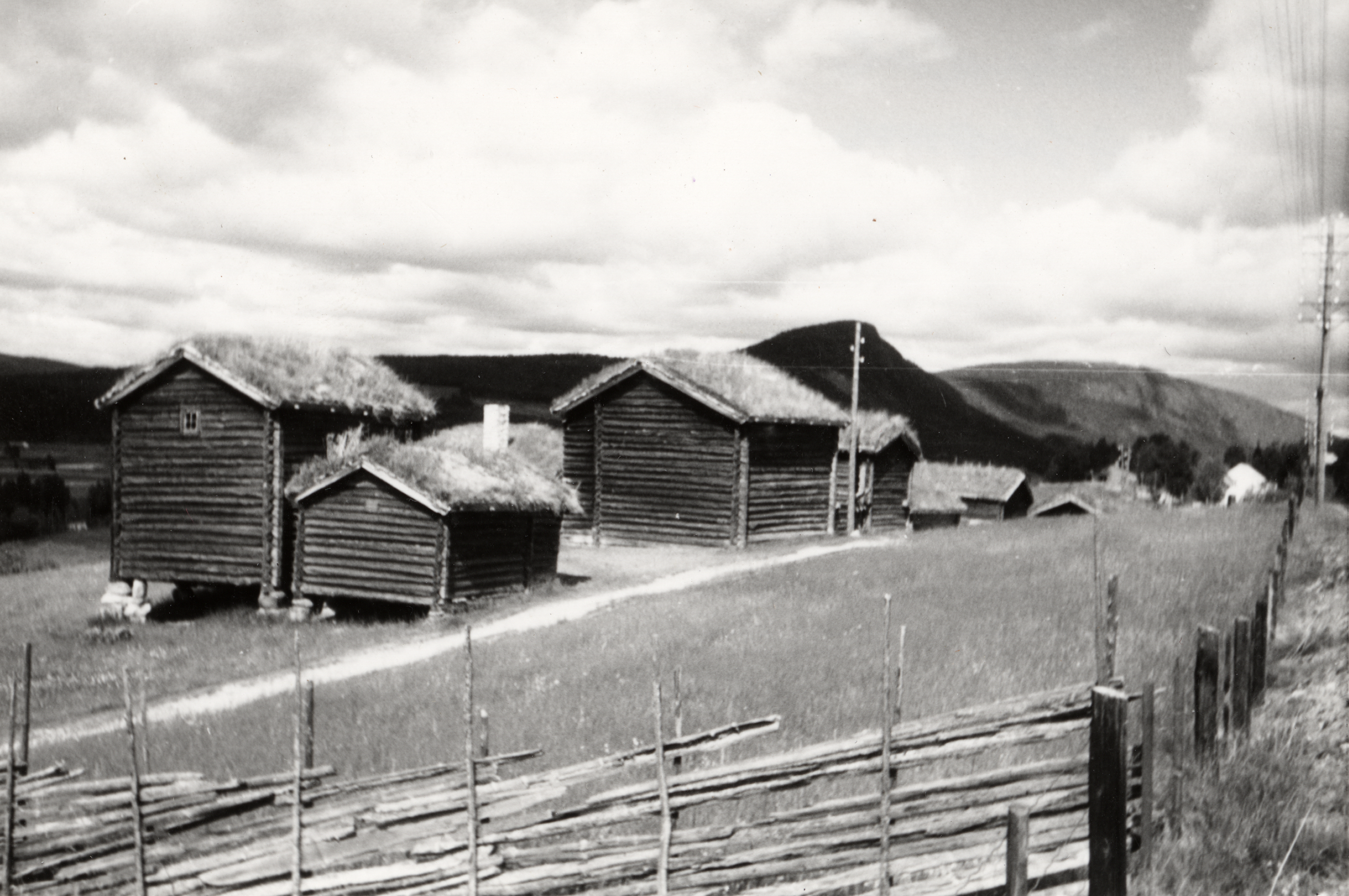 Husan Nordre, Alvdal museum, Husantunet, Hedmark